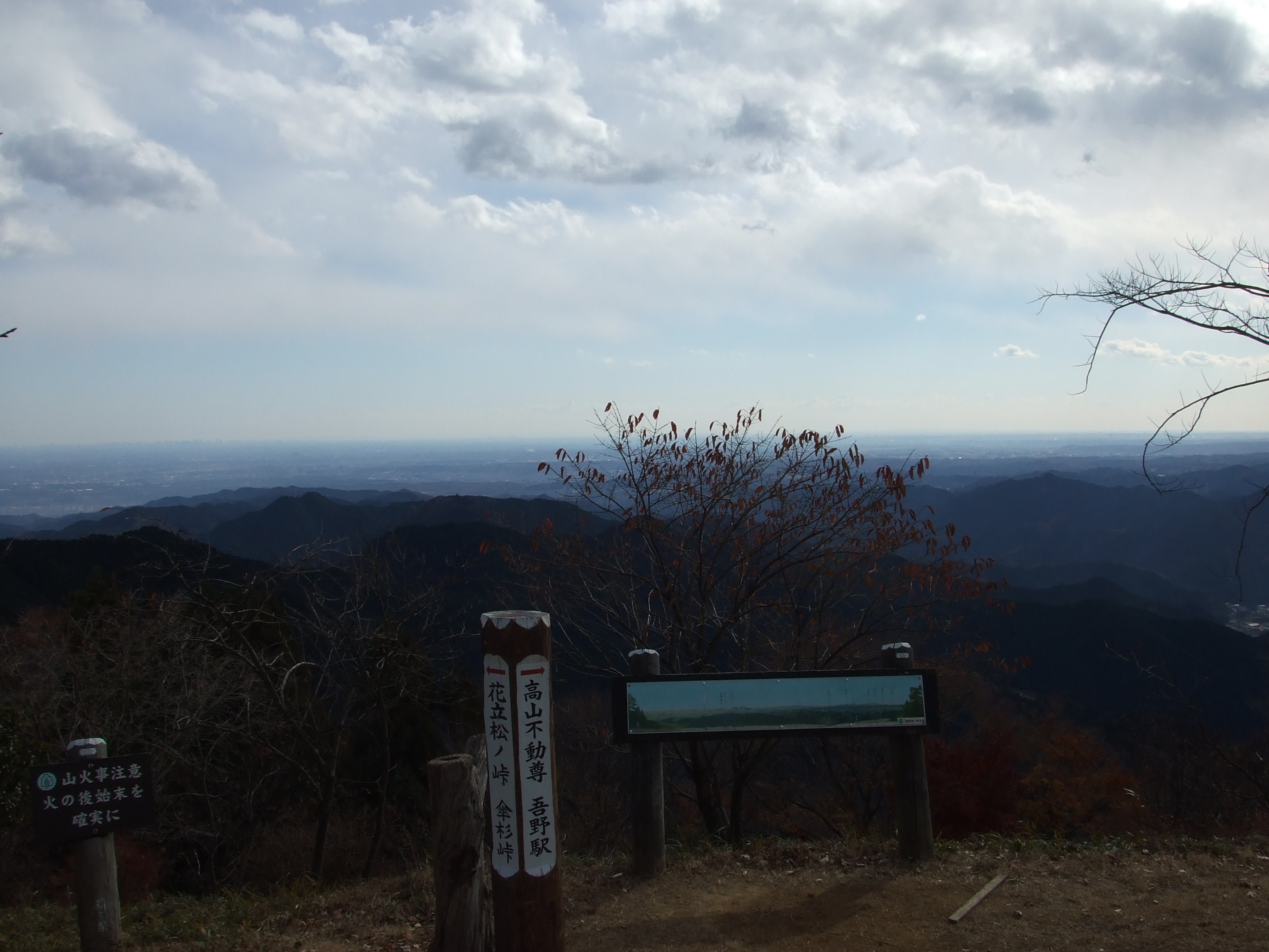 埼玉県飯能市と越生町の境界にある関八州見晴台からの展望